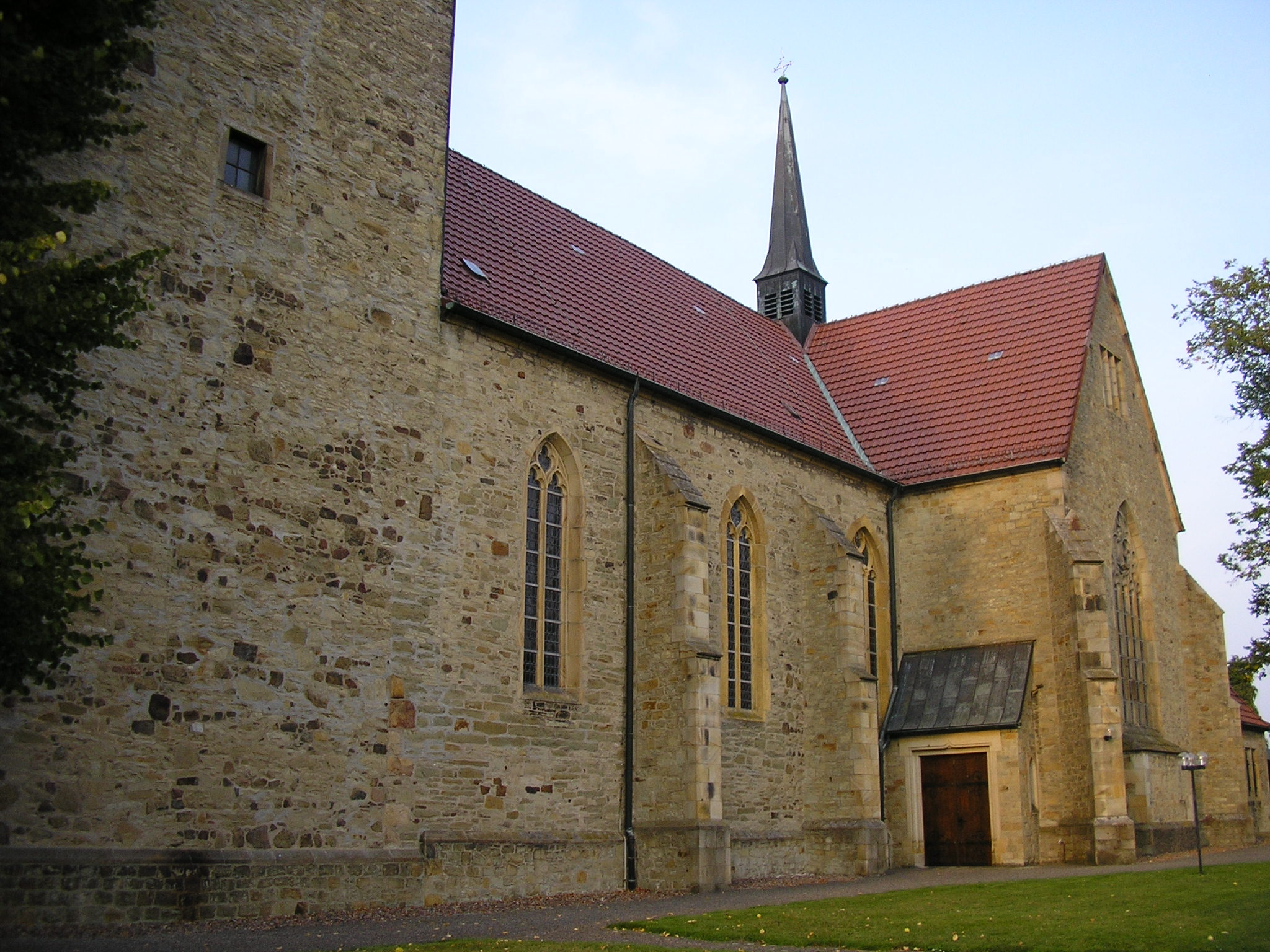 St Johannis Pfarrkirche Riemsloh